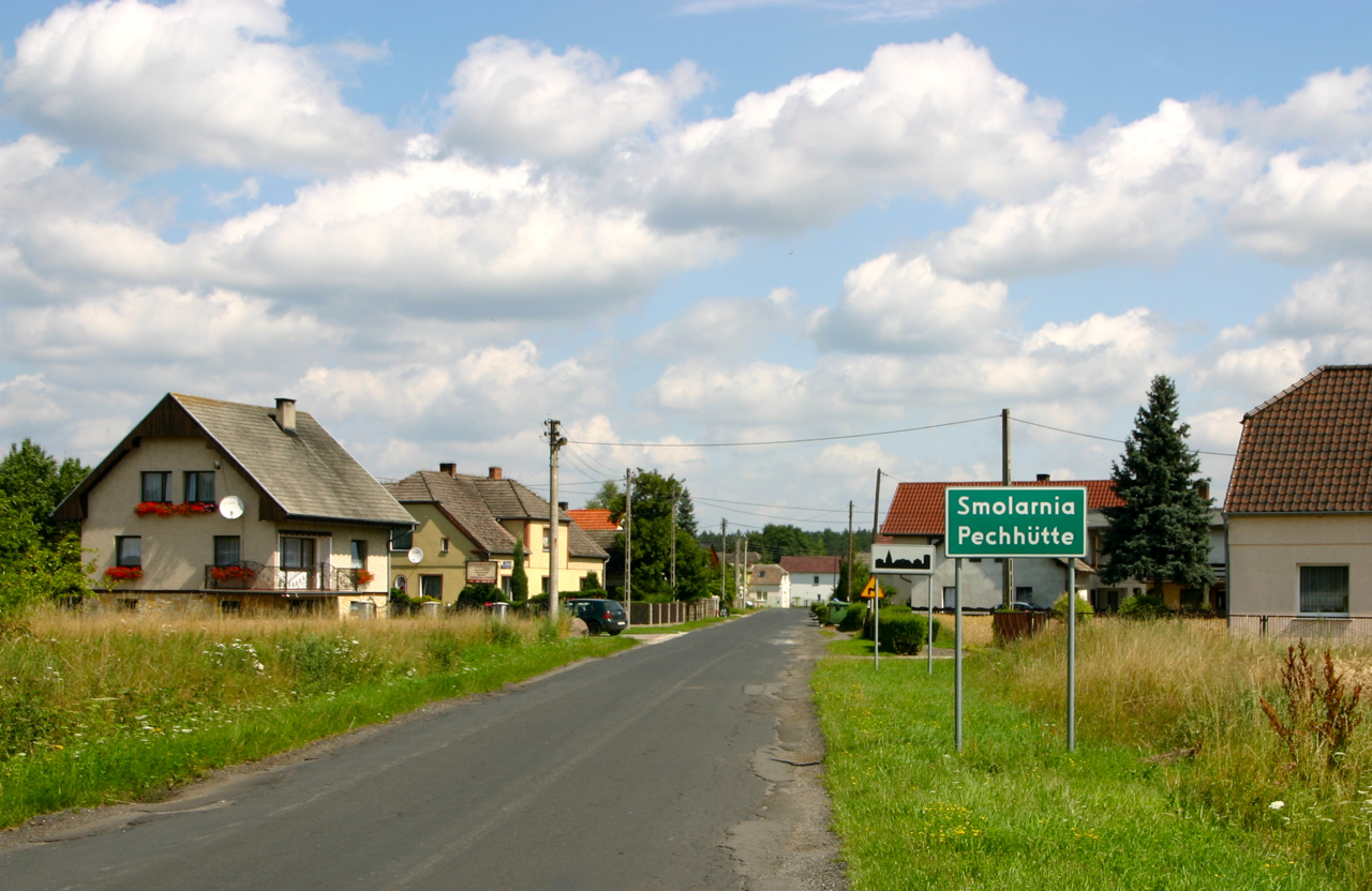 Smolarnia (dodatkowa nazwa w j. niem. Pechhütte) – wieś w Polsce położona w województwie opolskim, w powiecie krapkowickim, w gminie Strzeleczki.